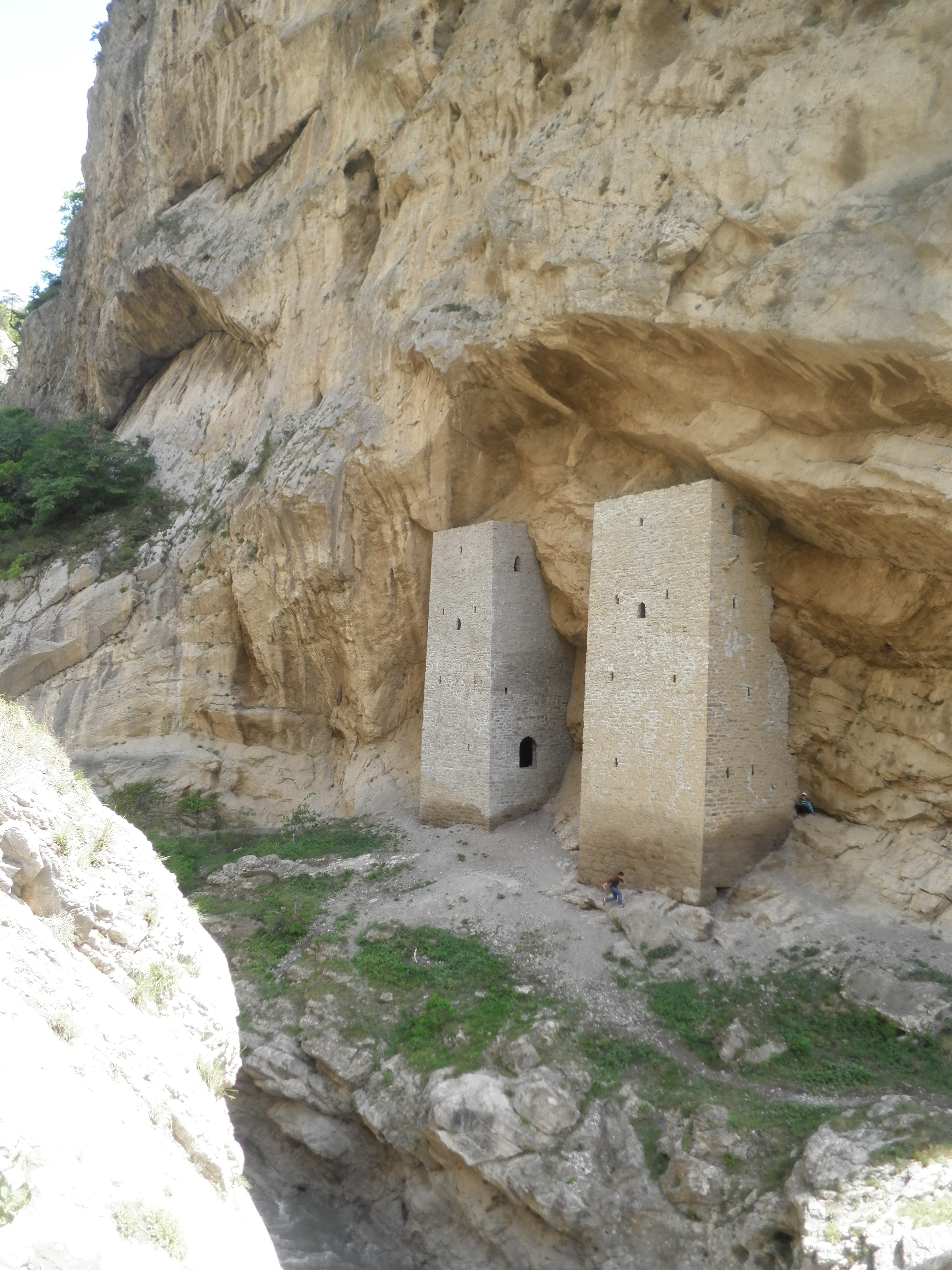 Башни в Чечне